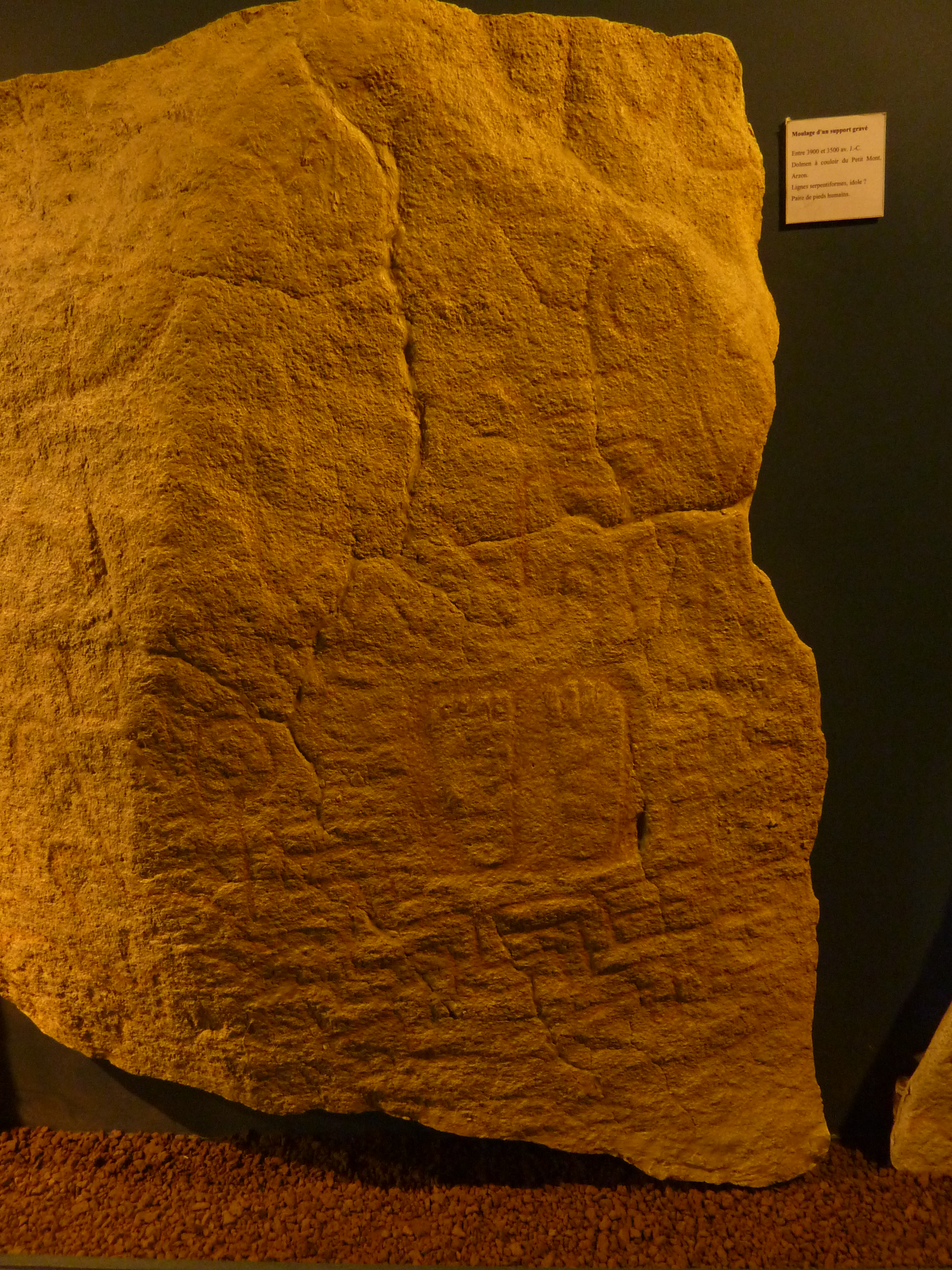 Gravures en creux du dolmen du Petit Mont en Arzon représentant des lignes serpentiformes (idole ?) et des pieds humains datant entre 3 900 et 3 500 avant J.-C. (moulage, Musée de préhistoire de Carnac)